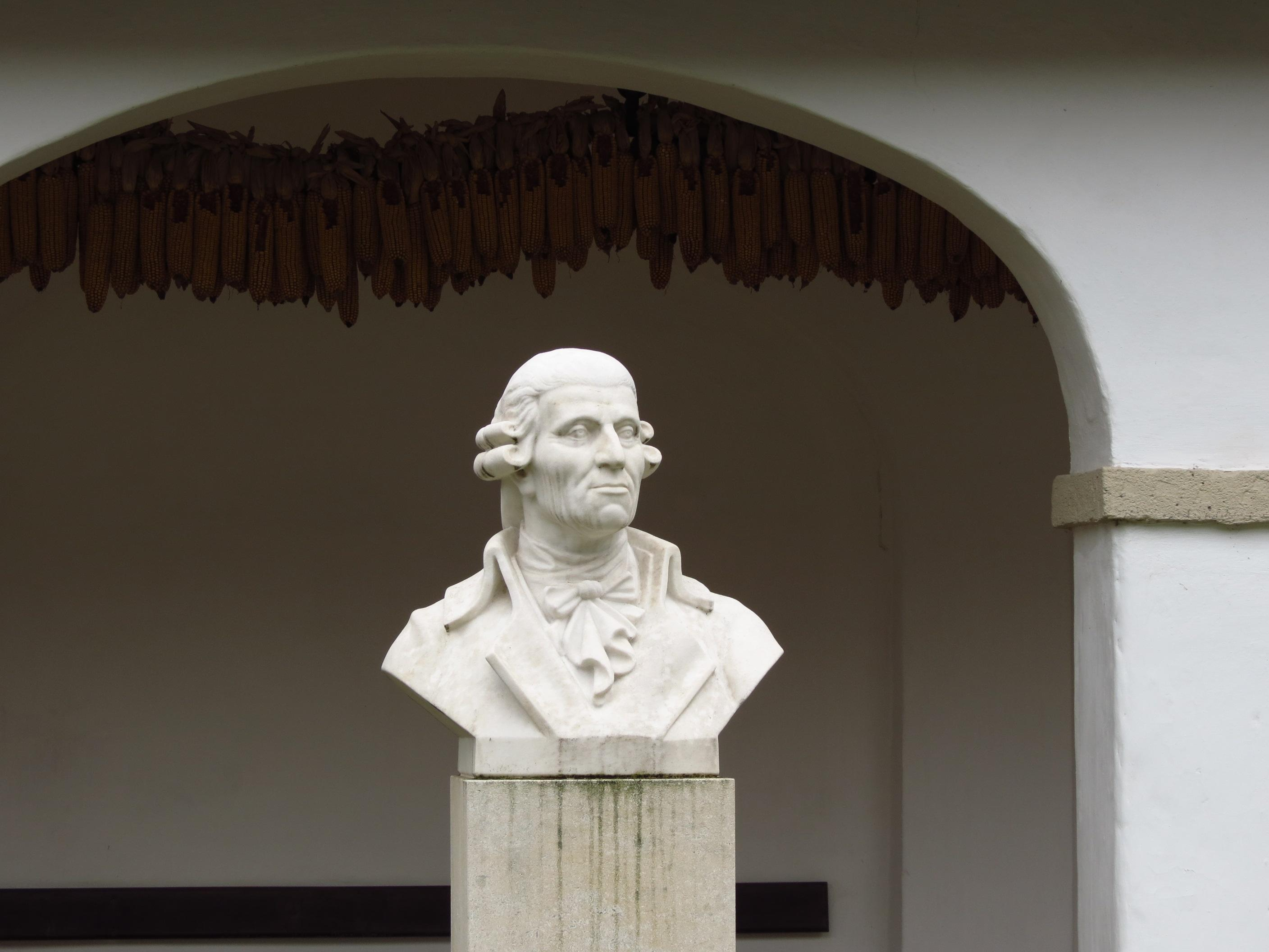 Haydn-Büste im Hinterhof von Joseph Haydns Geburtshaus in Rohrau.